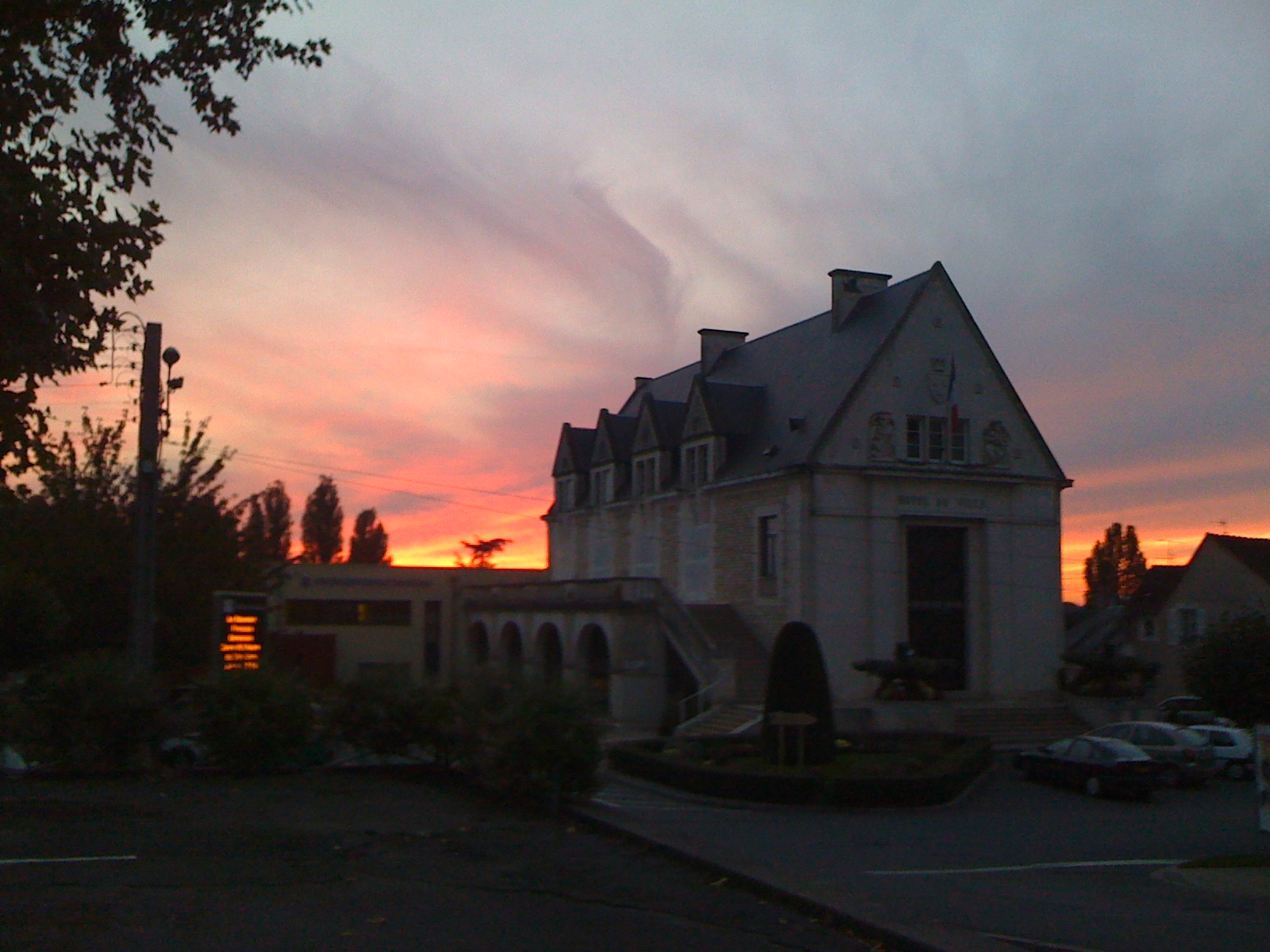 Coucher de soleil sur la mairie de Buzançais